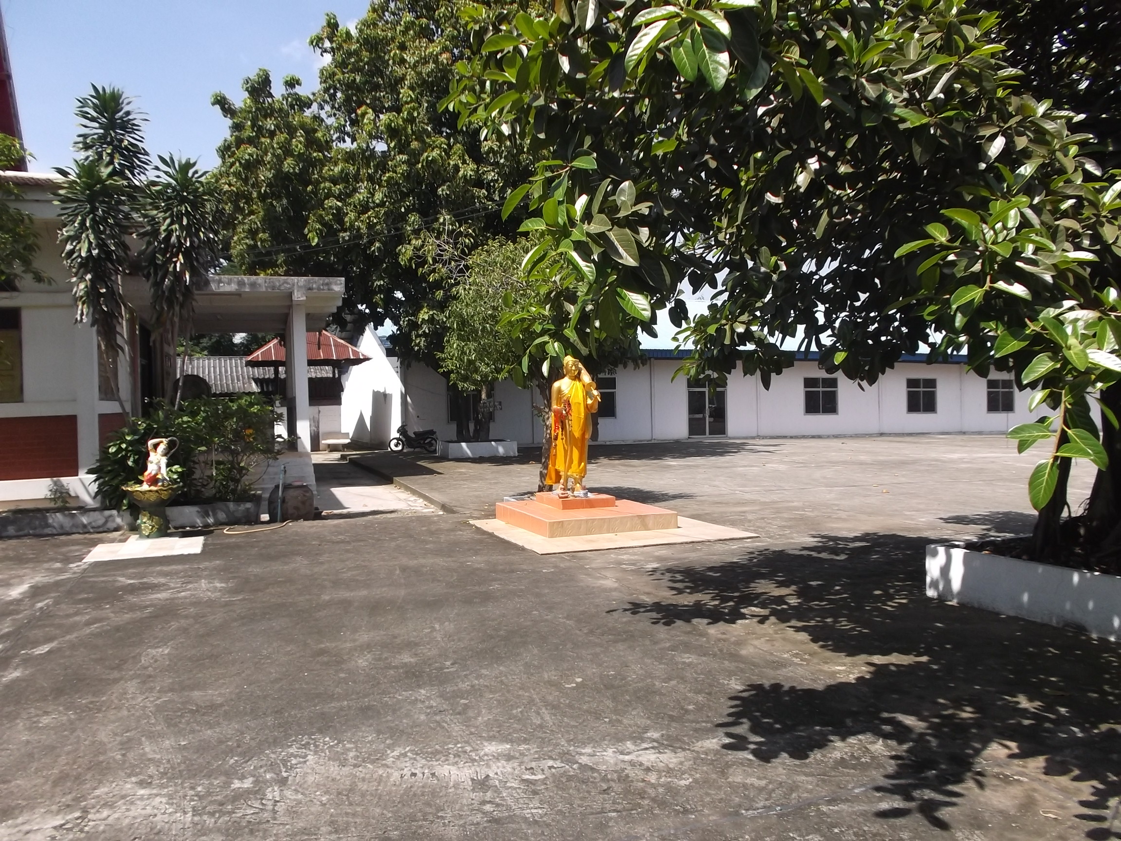 บริเวณวัดน่ารื่นรมณ์ที่สุดแห่งหนึ่งของประเทศไทย